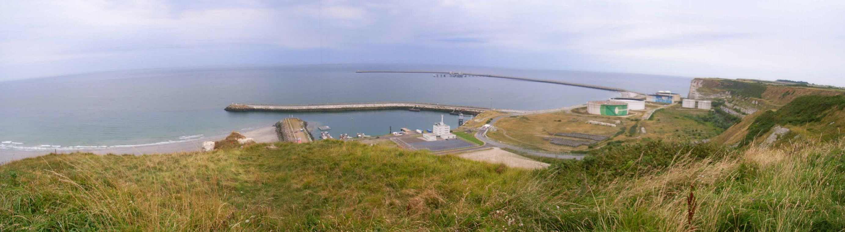 Panoramamontage Cap d'Antifer, Saint-Jouin-Bruneval, Dep. Seine-Maritime, France.